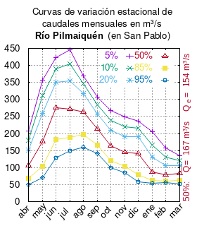 Curvas de variación estacional del río Pilmaiquén en San Pablo. # Dirección General de Aguas # Diagnóstico y clasificación de los cursos y cuerpos de agua según objetivos de calidad. Cuenca del río Bueno. # Santiago de Chile # Ministerio de Obras Públicas (Chile) # 2004 # url: # urlarchivo: # Tabla 4.4: Río Pilmaiquén en San Pablo (m3/s), pág. 48 mes 5% 10% 20% 50% 85% 95% abr 207.56 179.68 150.61 106.70 67.70 50.00 may 357.11 310.43 259.27 177.23 102.75 71.16 jun 422.50 389.95 350.52 275.17 182.35 127.83 jul 446.42 403.89 355.20 272.48 189.60 150.07 ago 369.15 345.92 317.78 264.01 197.78 158.87 sep 306.91 283.82 257.70 212.93 165.94 141.98 oct 266.90 239.34 209.75 162.99 119.46 99.54 nov 248.50 220.64 191.05 145.08 103.37 84.71 dic 237.36 215.96 190.04 140.45 79.39 58.21 ene 205.97 165.79 129.95 87.47 61.73 53.81 feb 157.72 130.64 106.55 78.12 61.01 55.77 mar 134.60 120.06 104.90 82.00 61.66 52.43 This plot was created with Gnuplot.